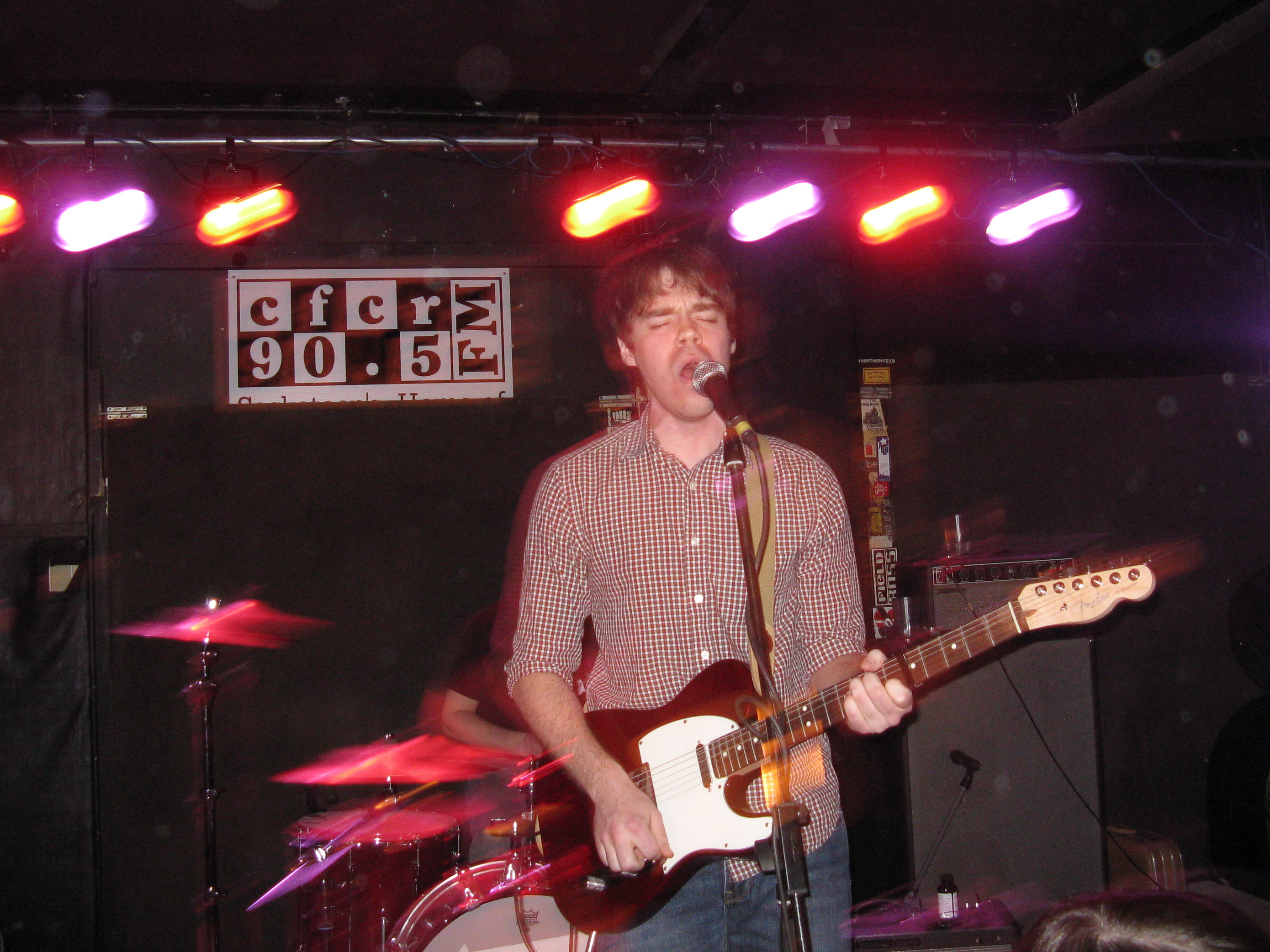 Maybe Smith at Amigo's Cantina in Saskatoon